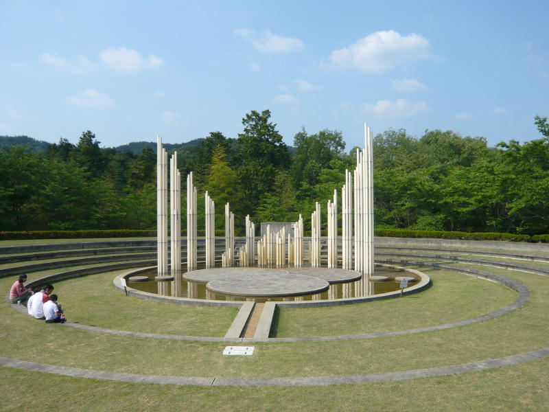 人道の丘のモニュメント